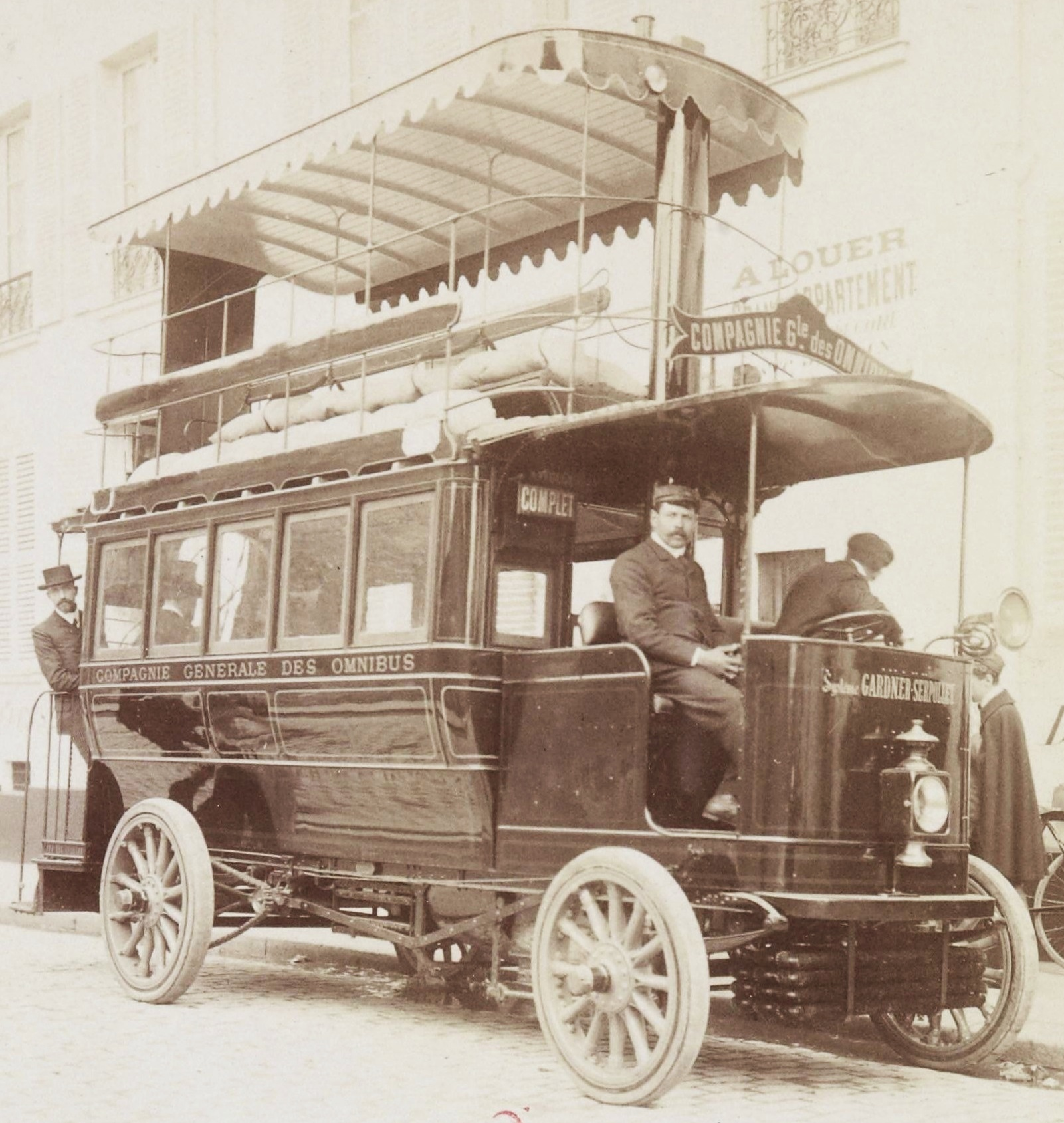 [Collection Jules Beau. Photographie sportive] : T. 30. AnnÃ©e 1905 / Jules Beau : F. 2. Omnibus automobiles, Paris